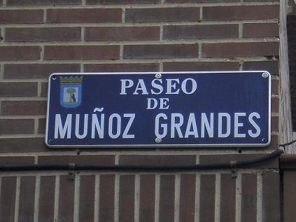 Placa conmemorativa